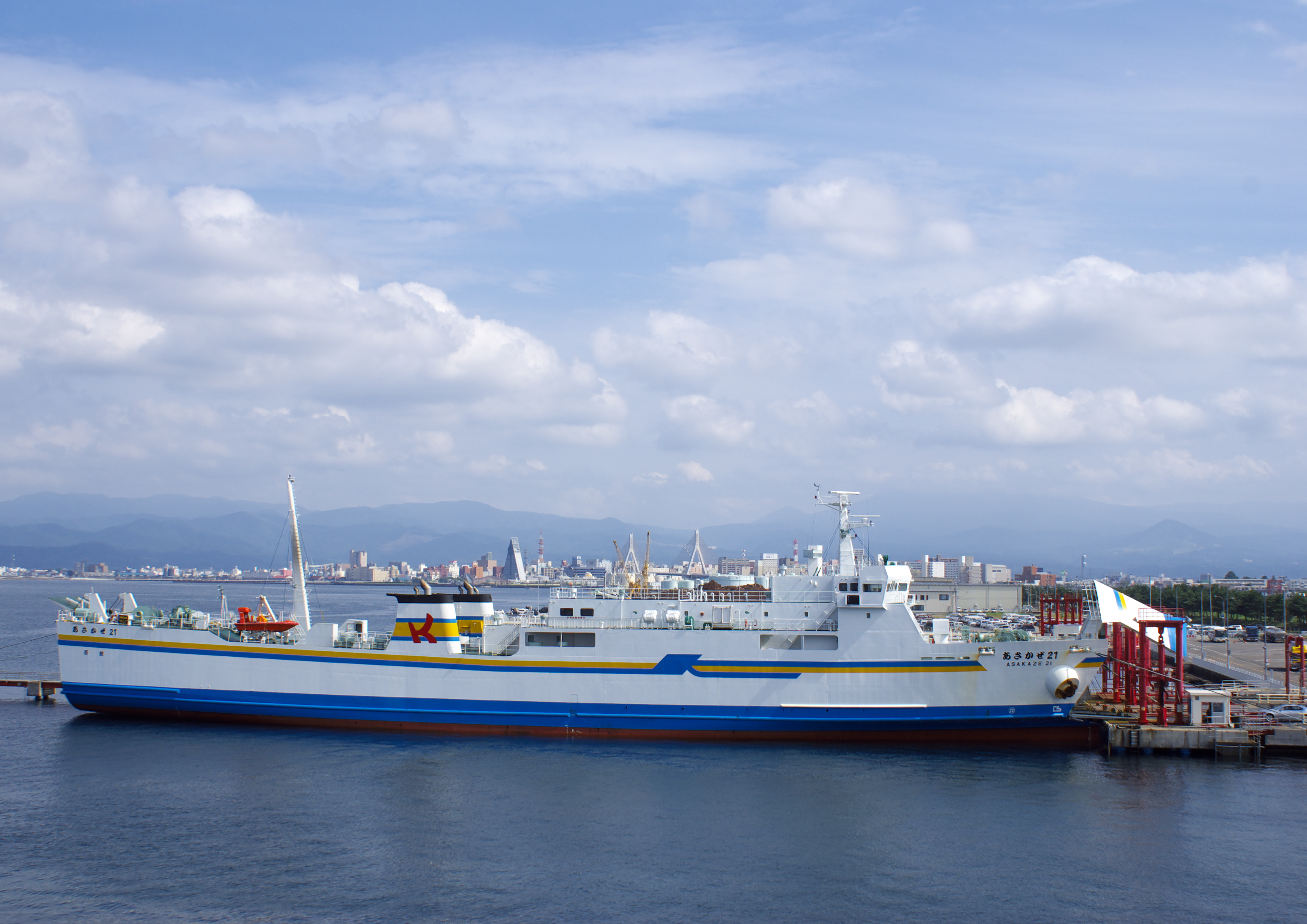 青森港フェリーターミナルに接岸中の青函フェリー「あさかぜ21」、2009年8月15日撮影。